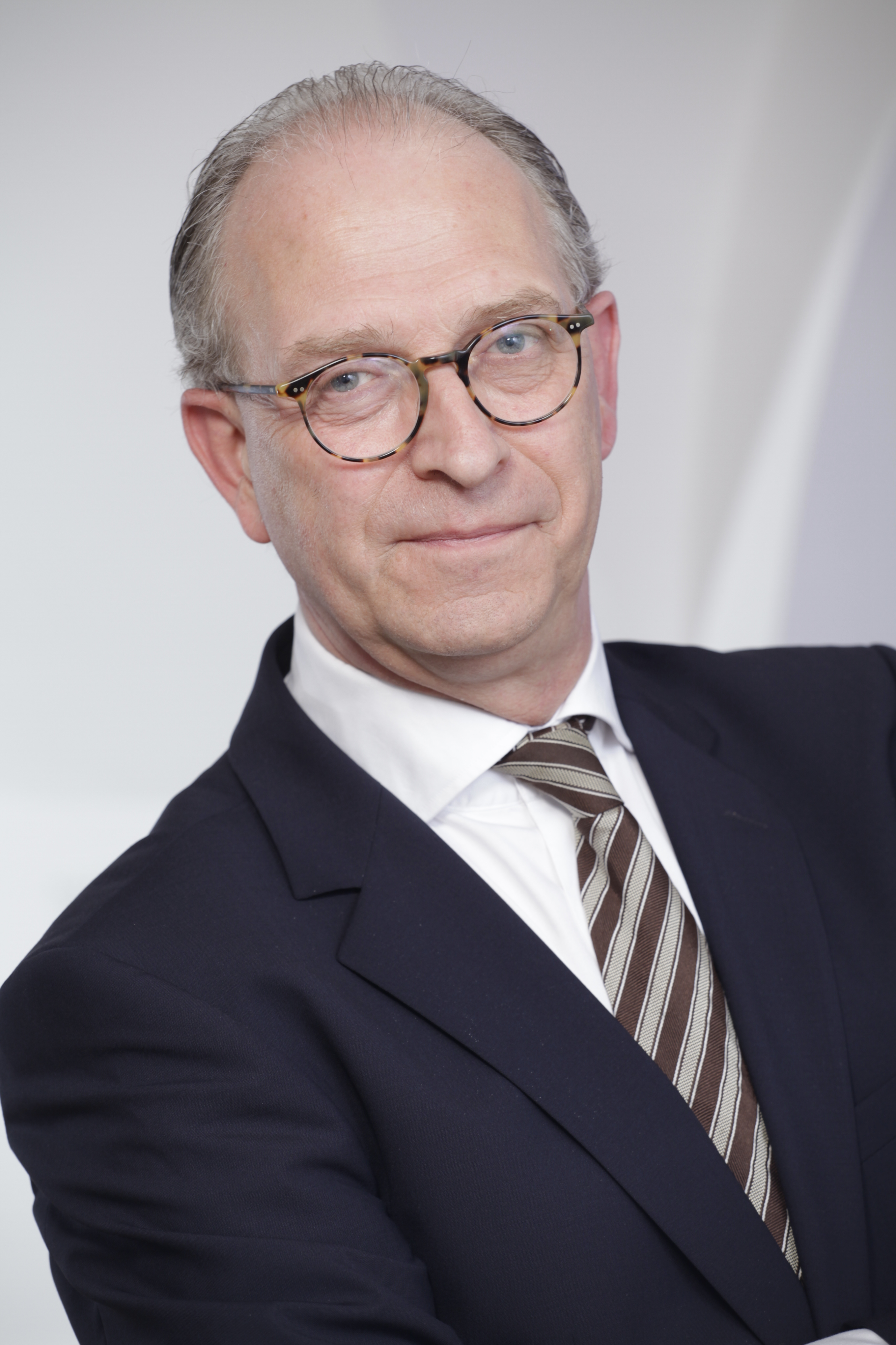 Dr. Roland Kaehlbrandt (Foto; Jérôme Gravenstein, 2012)